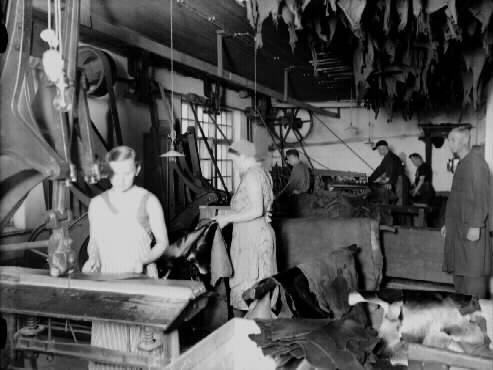 Epilän Nahkatehtaan työntekijöitä työssään 1930-luvulla. Kuva: Mauno Mannelin, Tampereen museoiden kuva-arkisto.